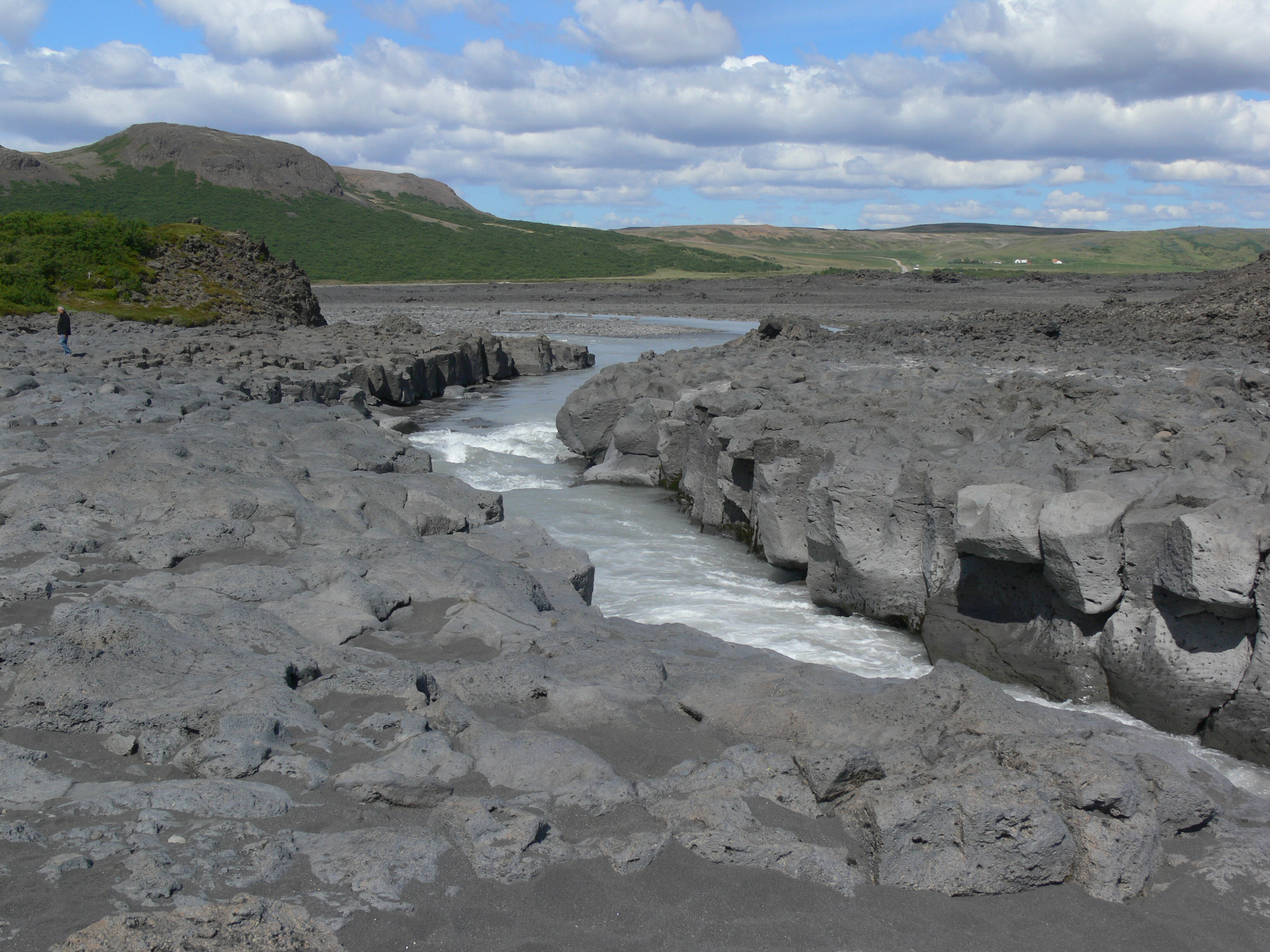 Das Flüsschen Geitá zwischen Fljótstunga und Gilbakki. Kalmanstunga im Hintergrund.